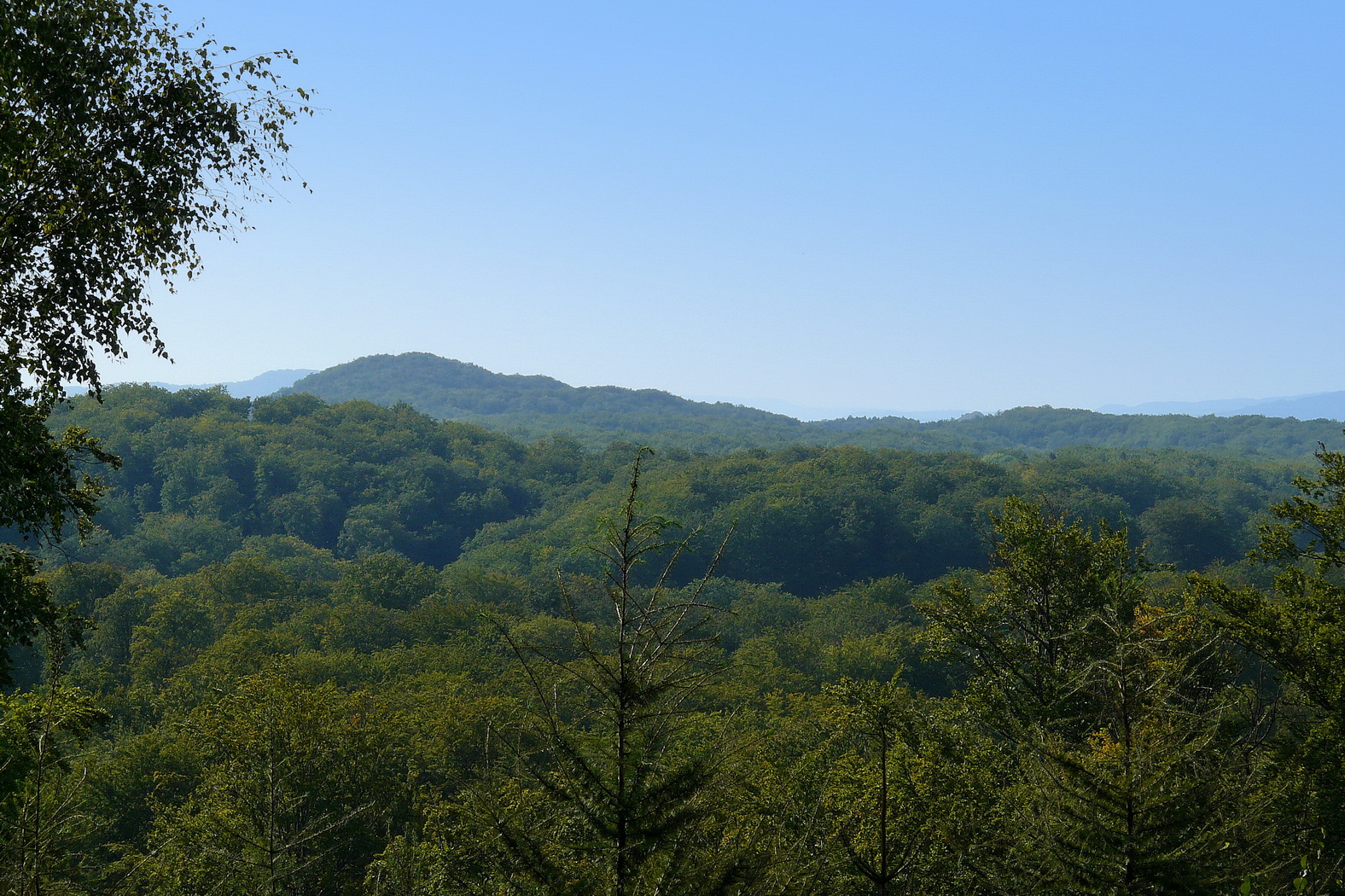 Vrch Dub a Hradčanské bučiny z Pecopaly